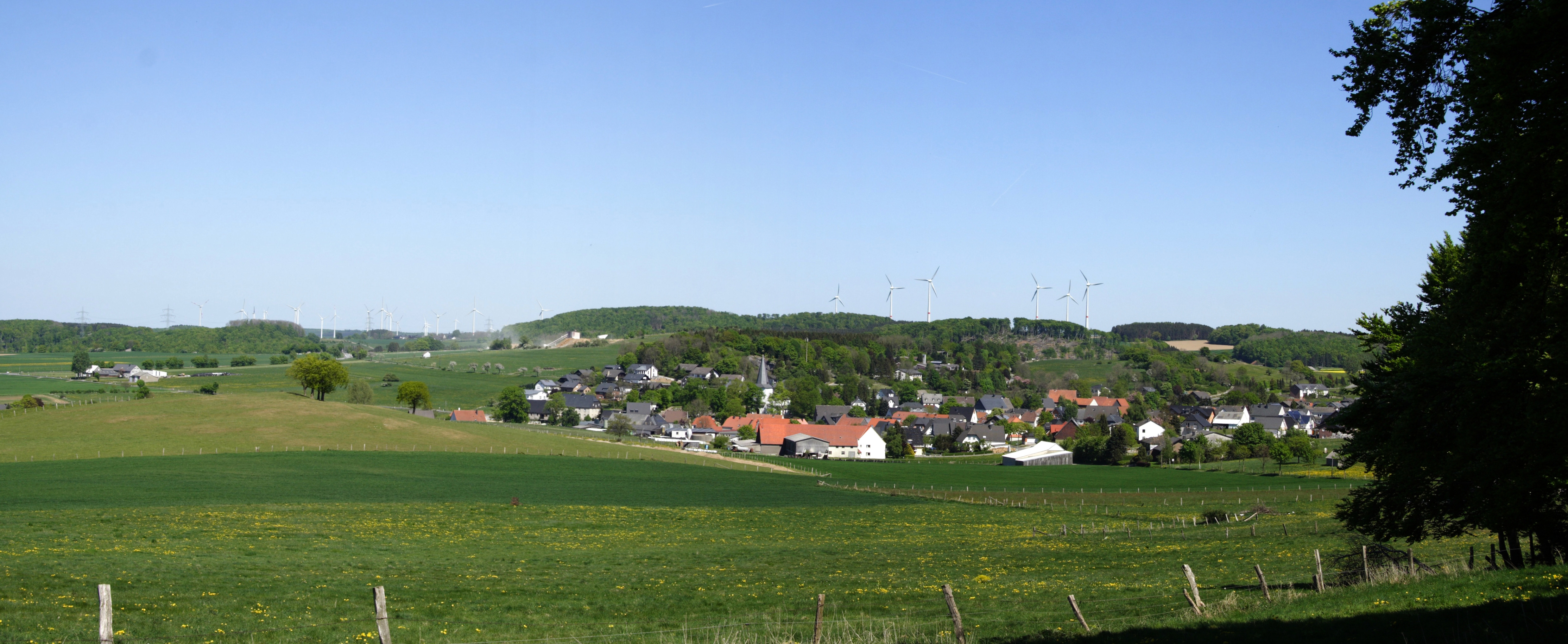 Panorama von Thülen auf der Briloner Hochfläche